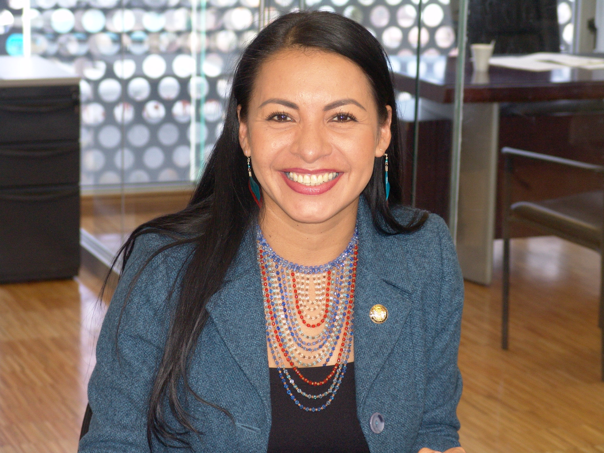 26 de agosto